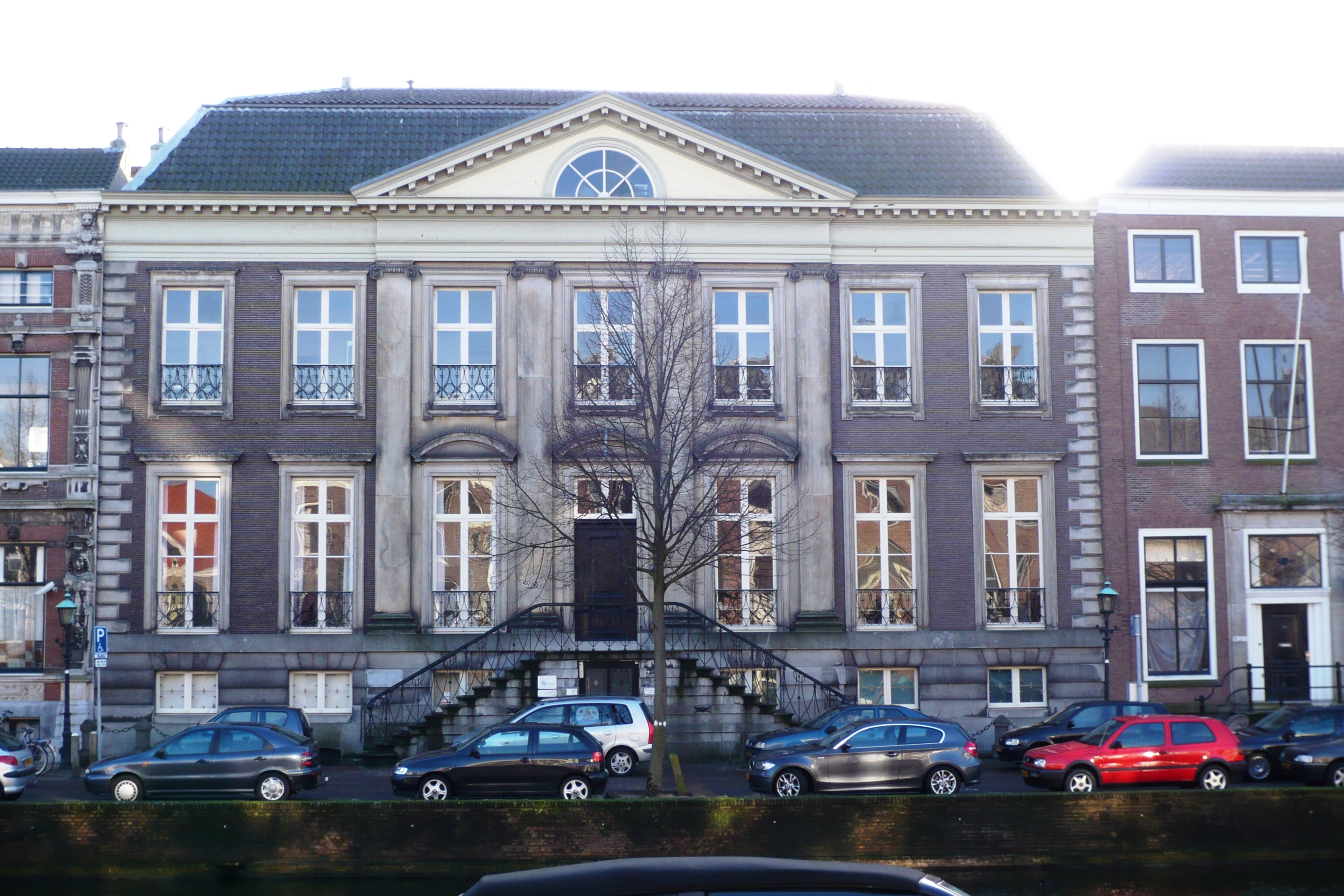 Huis Barnaart, Nieuwe Gracht 7, Haarlem. Vormalige ambtswoning van de Commissaris der Koningin, ontworpen in 1805 door Abraham van der Hart.